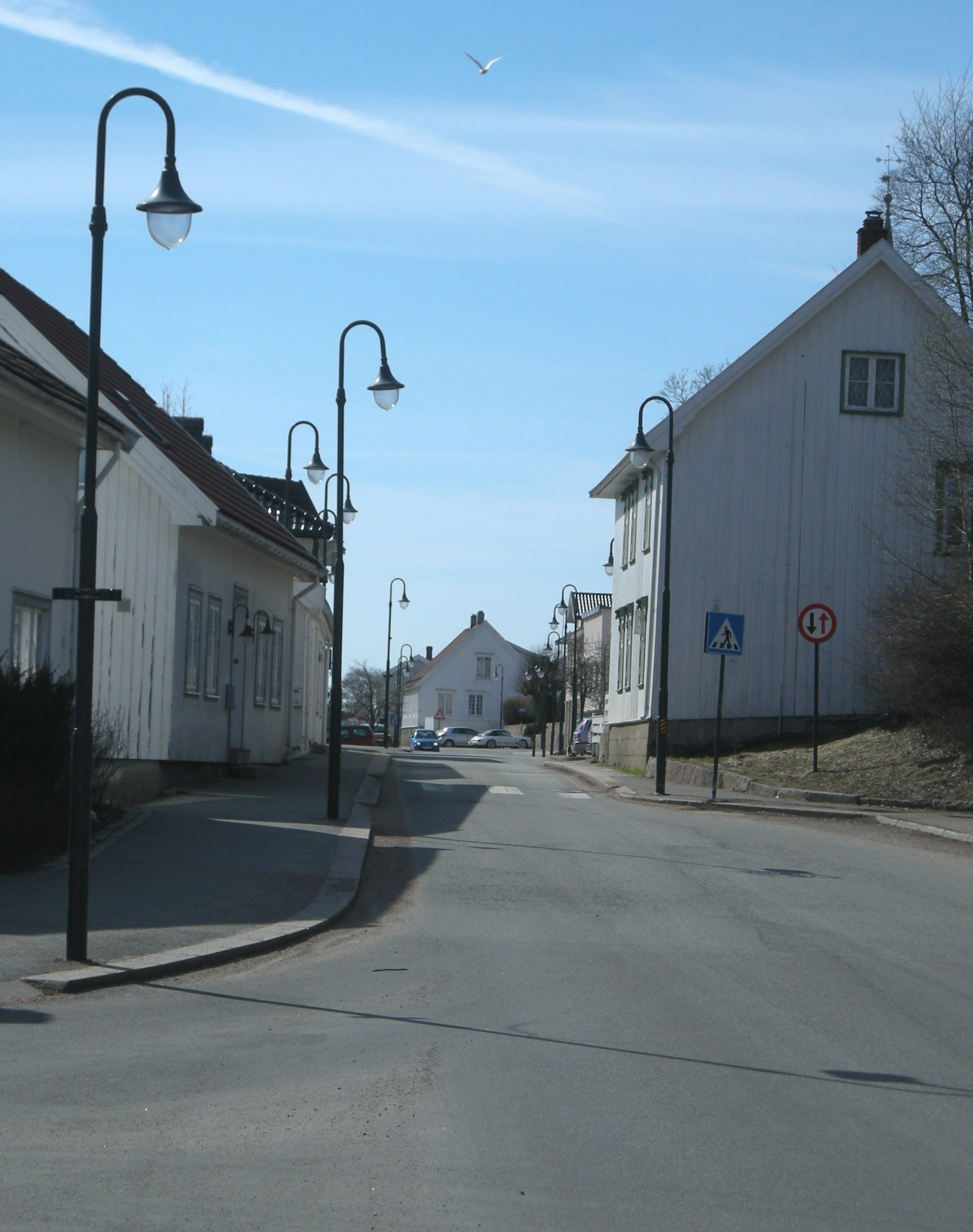 Storgaten (fylkesvei 990) i Svelvik